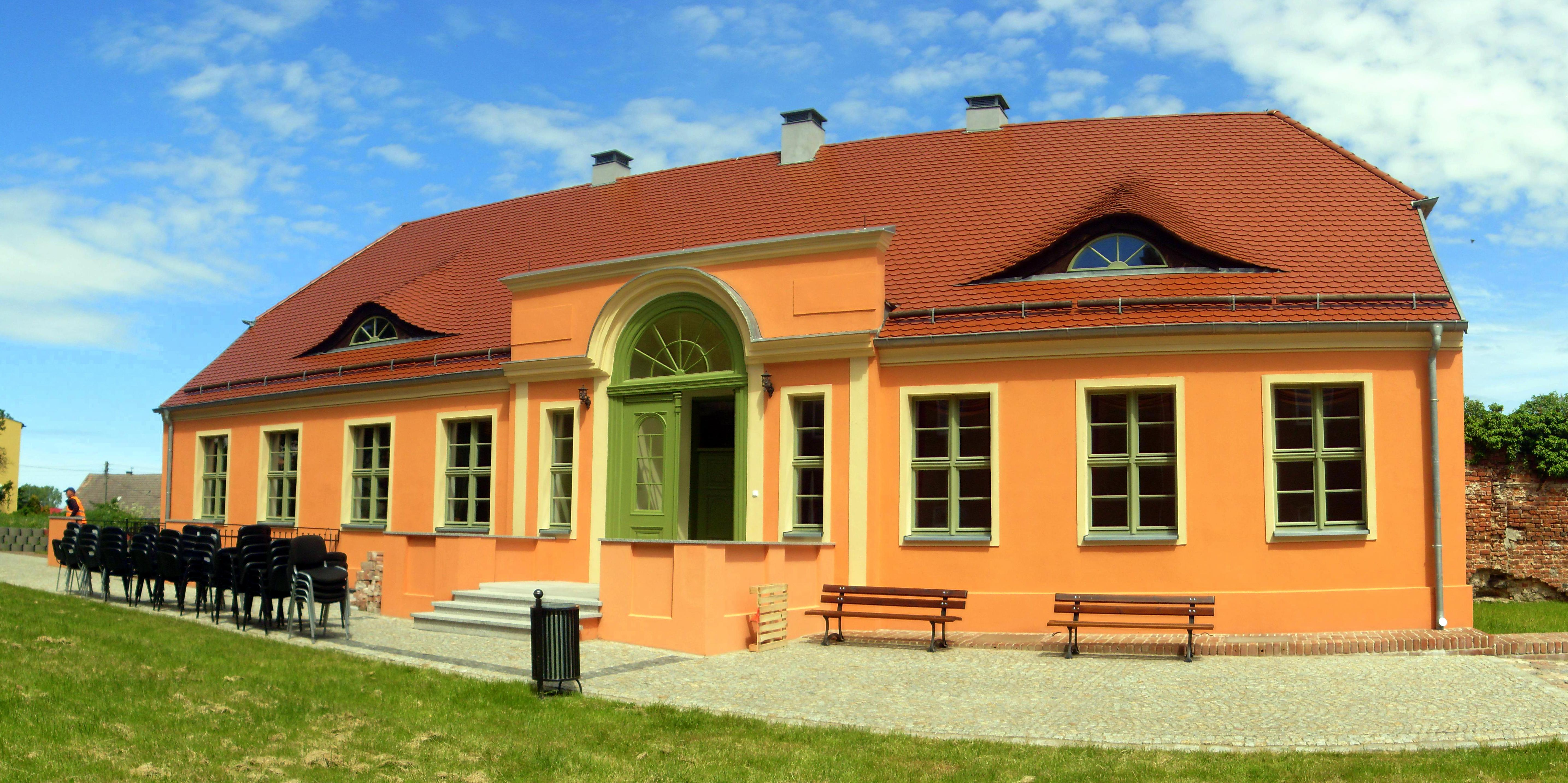 Wolin rodziny von Below z zrełomu XVIII i XIX wieku.